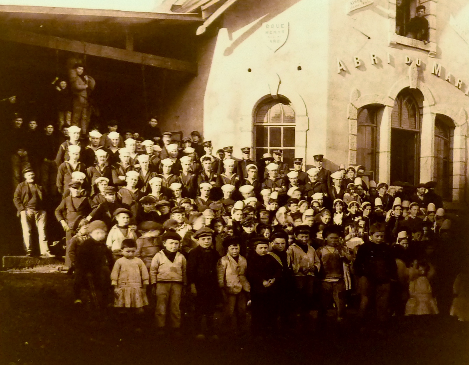 Marins américains avec des enfants devant l'Abri du marin de Sainte-Marine en 1917 ou 1918 (photographie de Jacques de Thézac)